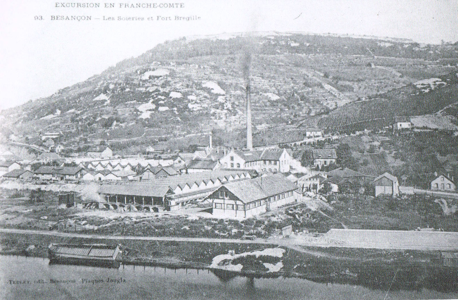 Les soieries des Prés-de-Vaux, à Besançon (Doubs, France).